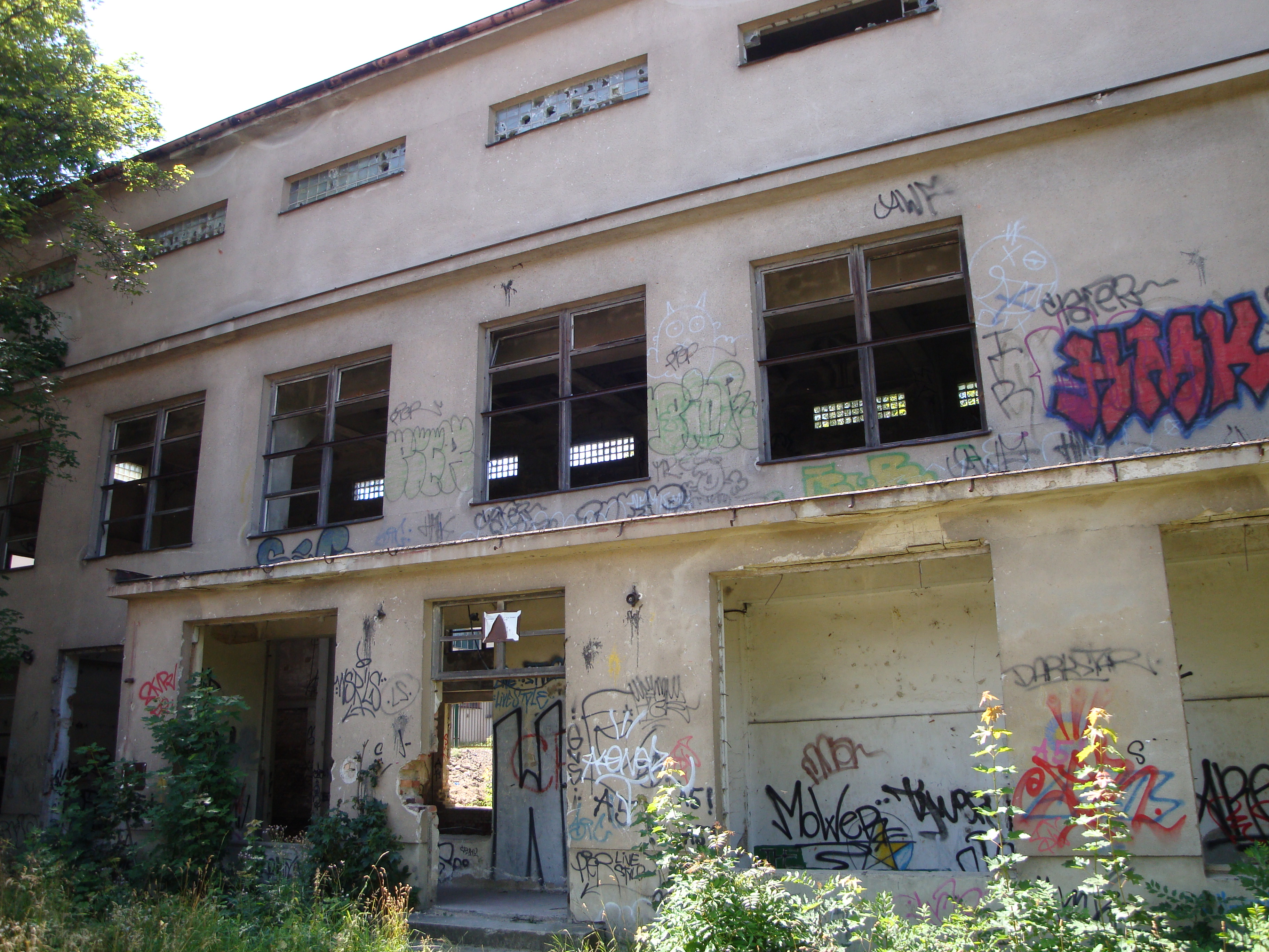 Chátrající důl Prokop na Březových Horách.